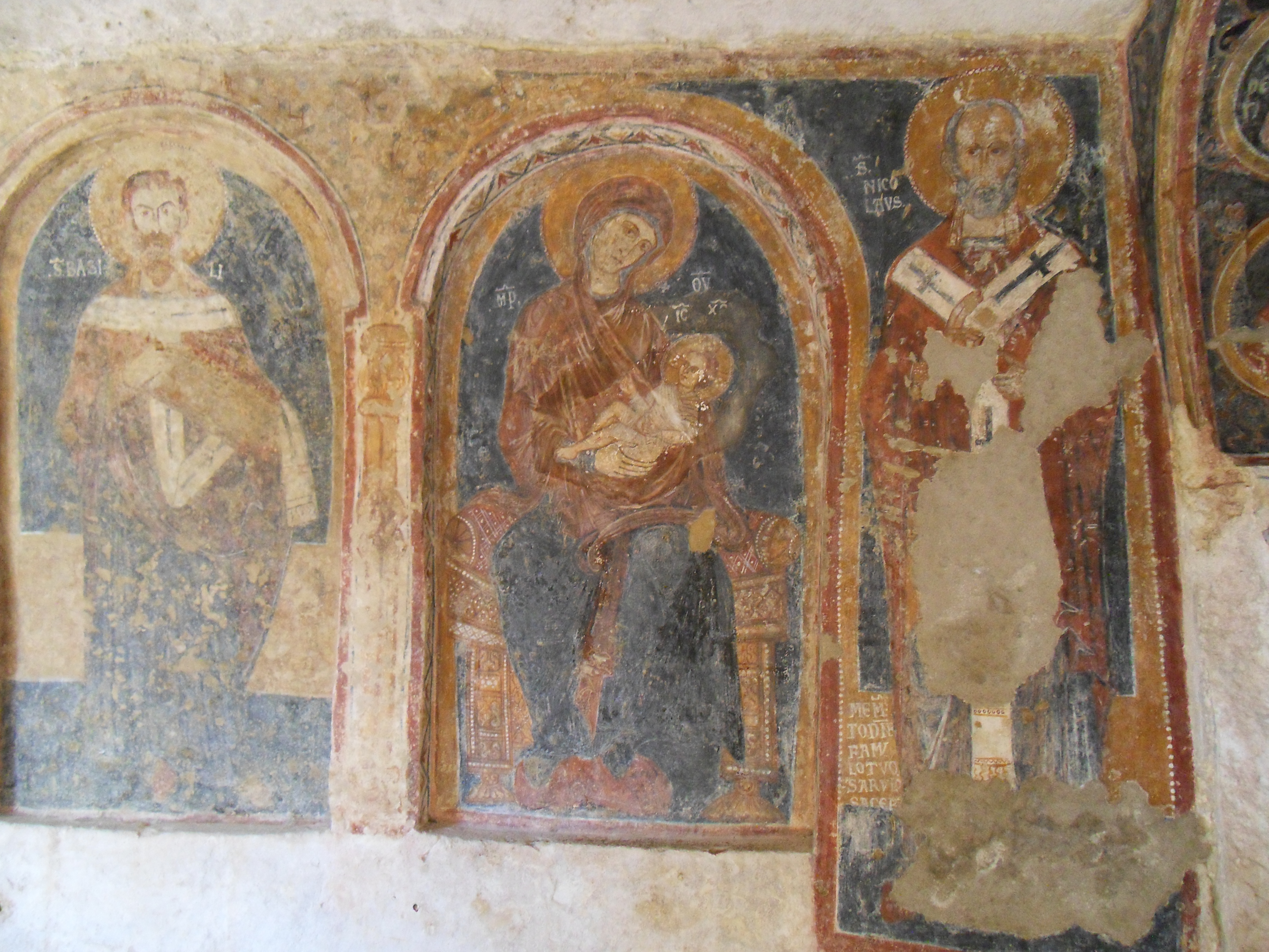 Affresco della Madonna con Bambino con San Nicola e San Basilio